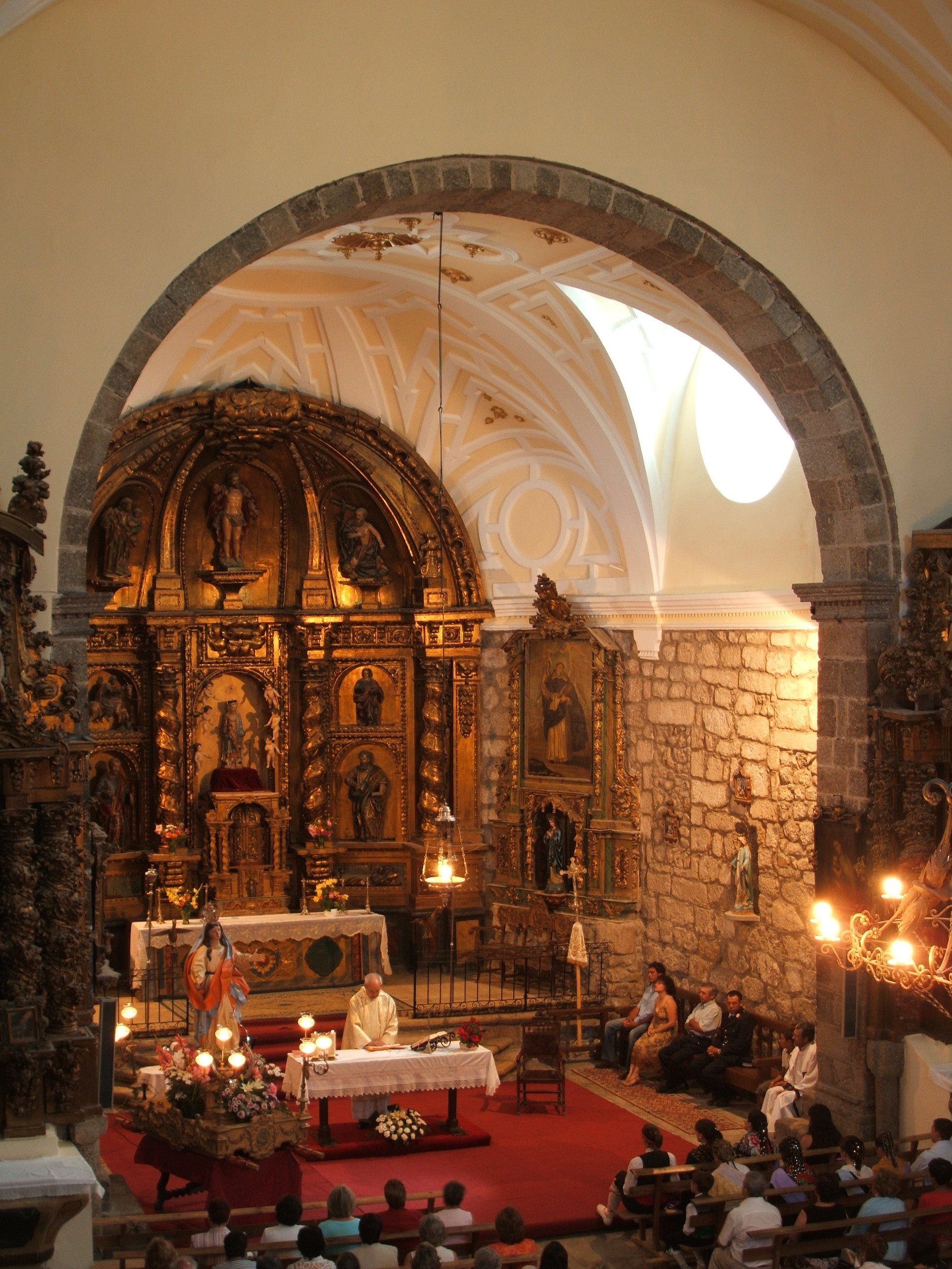 Capilla Mayor de la Iglesia Parroquial de Villafranca de la Sierra (Ávila, España). AUTOR: Alfredo (con permiso del autor).